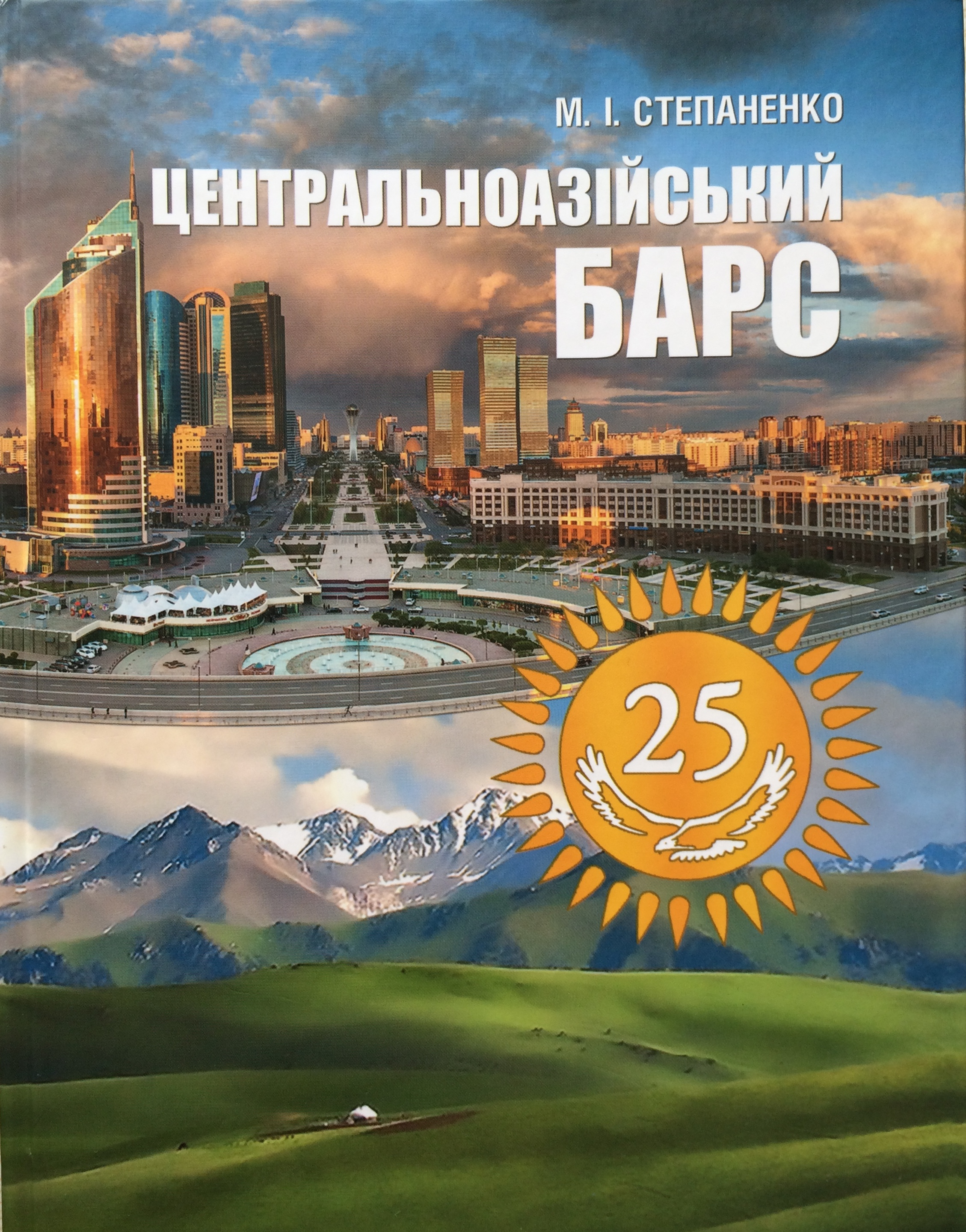 фото обкладинки